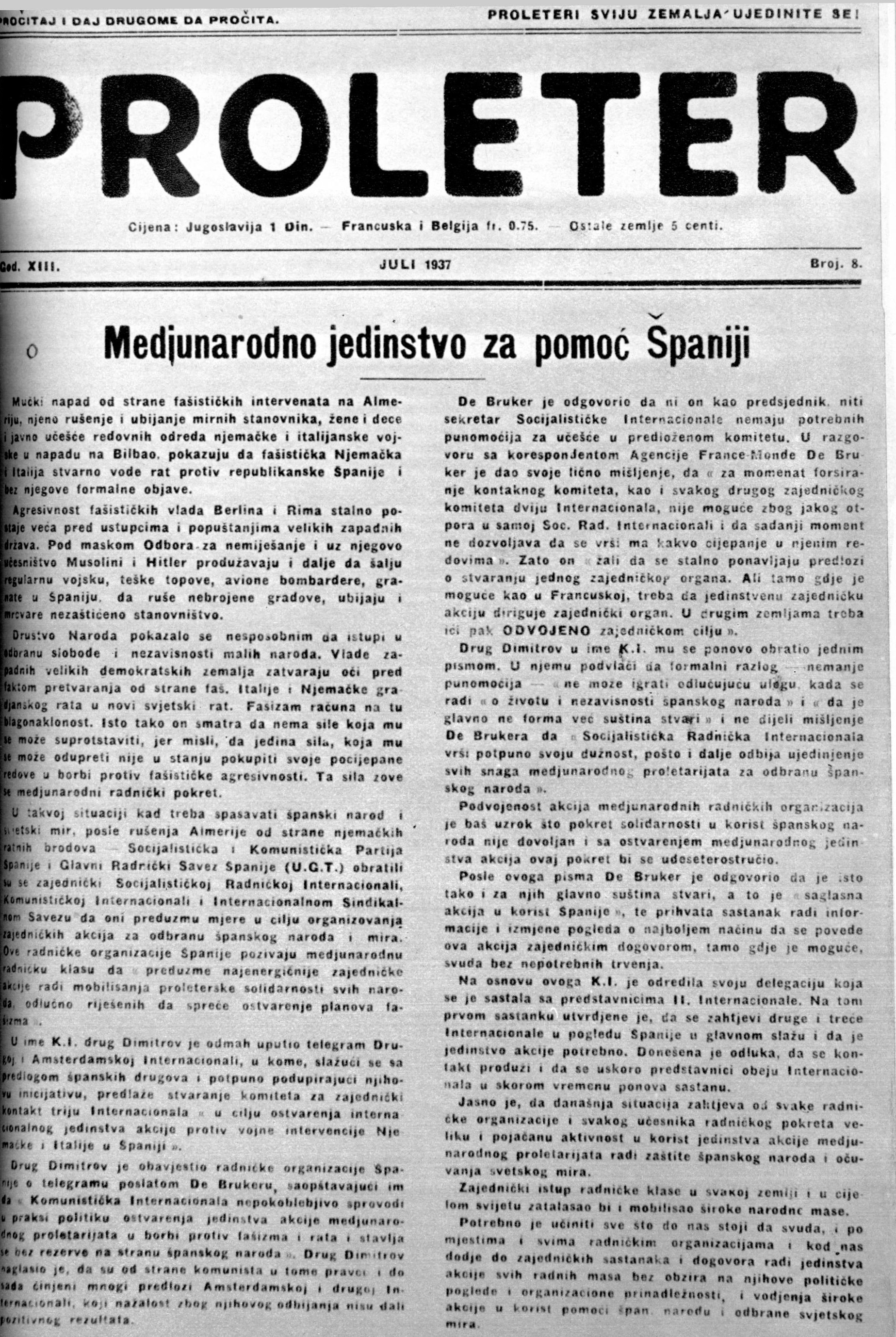 Srpskohrvatski / српскохрватски: Međunarodno jedinstvo za pomoć Španiji, Proleter juli 1937.